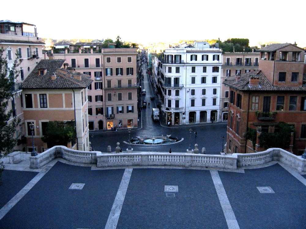 Piazza di Spagna, Roma, ItalyIMG_3623.JPG